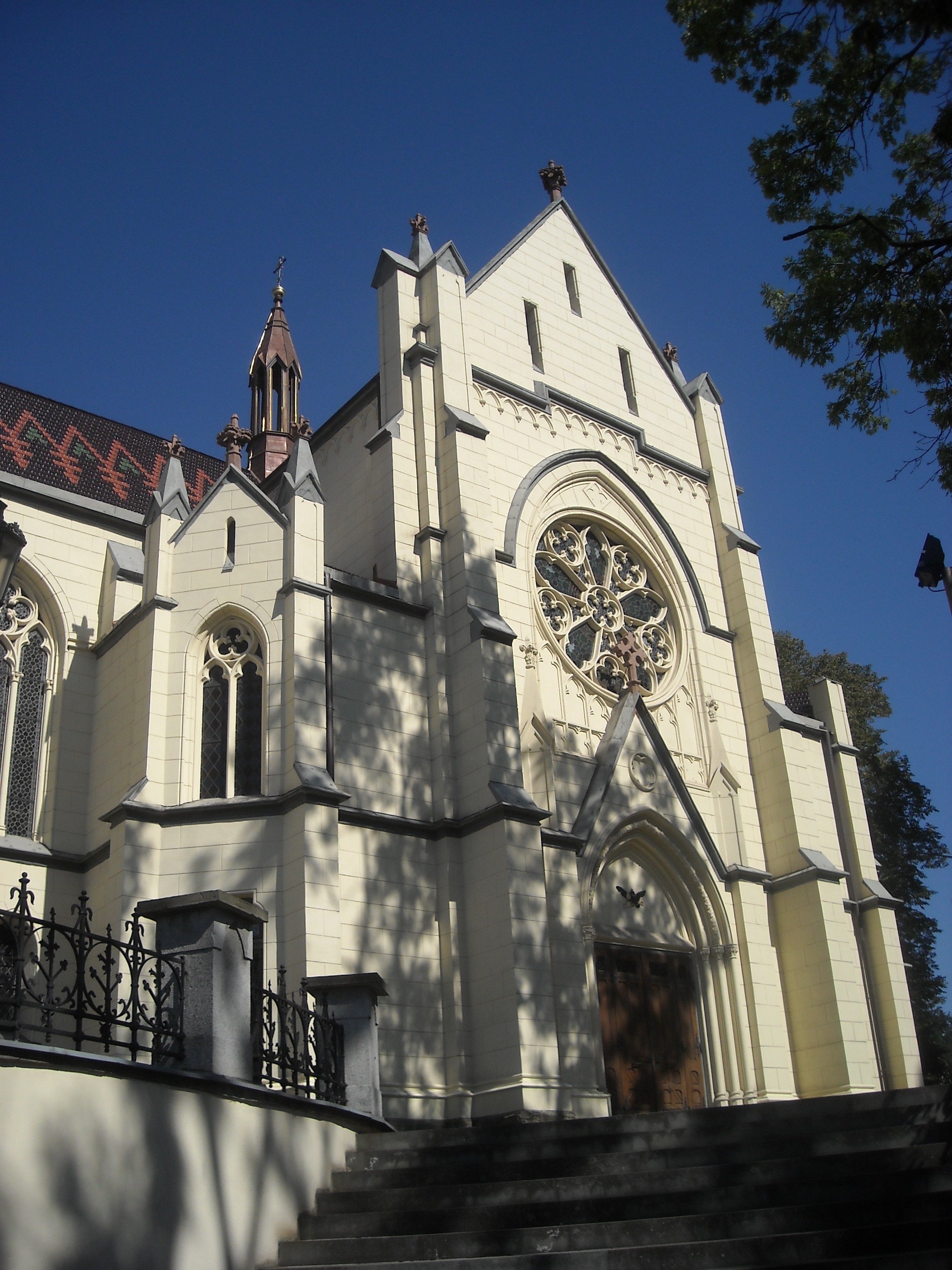 Kostel Narození P. Marie se sochami (Orlová), Orlová